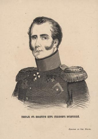 Пётр Степанович Котляревский. Данный рисунок был также использован для иллюстрирования статьи «Котляревский, Петр Степанович» опубликованной в тринадцатом томе «Военной энциклопедии», который был издан книгоиздательским товариществом Ивана Дмитриевича Сытина в 1913 году в столице Российской империи городе Санкт-Петербурге. Подробное описание к этой картинке можно прочесть в указанной статье.